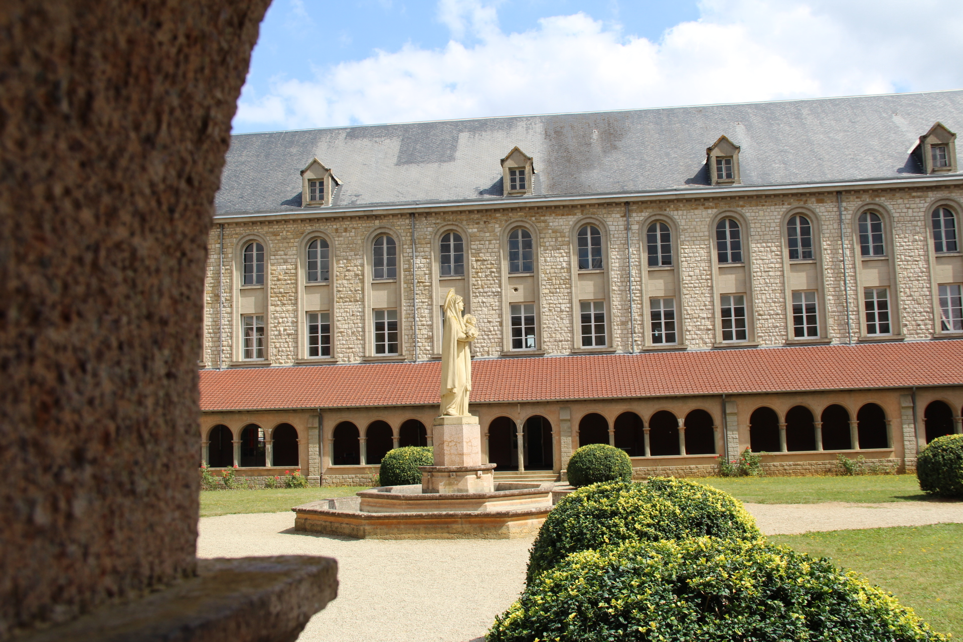 La cour de l'ancien grand séminaire de Sées, qui abrite aujourd'hui l'Institut scolaire Croix des Vents-Saint Joseph. Au centre, se trouve une statue de la Vierge Marie.